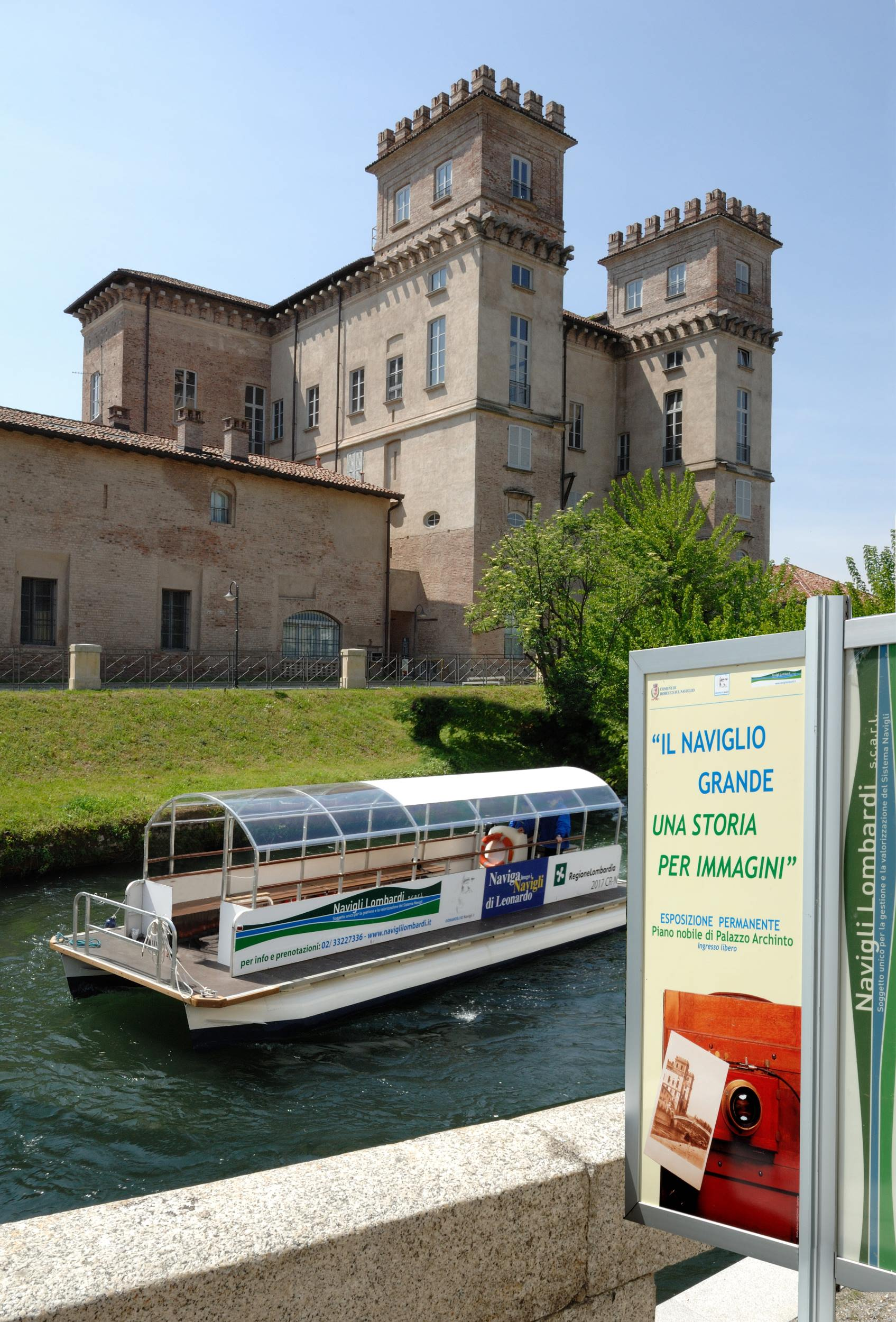 Robecco SN palazzo Archinto This is a photo of a monument which is part of cultural heritage of Italy.